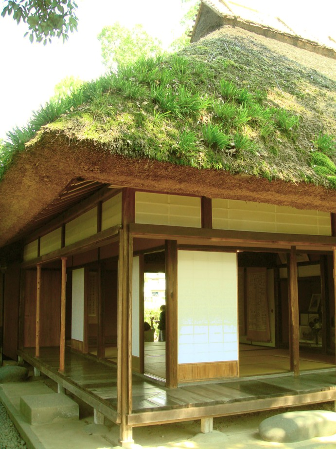 大分県日田市にあった咸宜園の現存建築「秋風庵」の南西側。